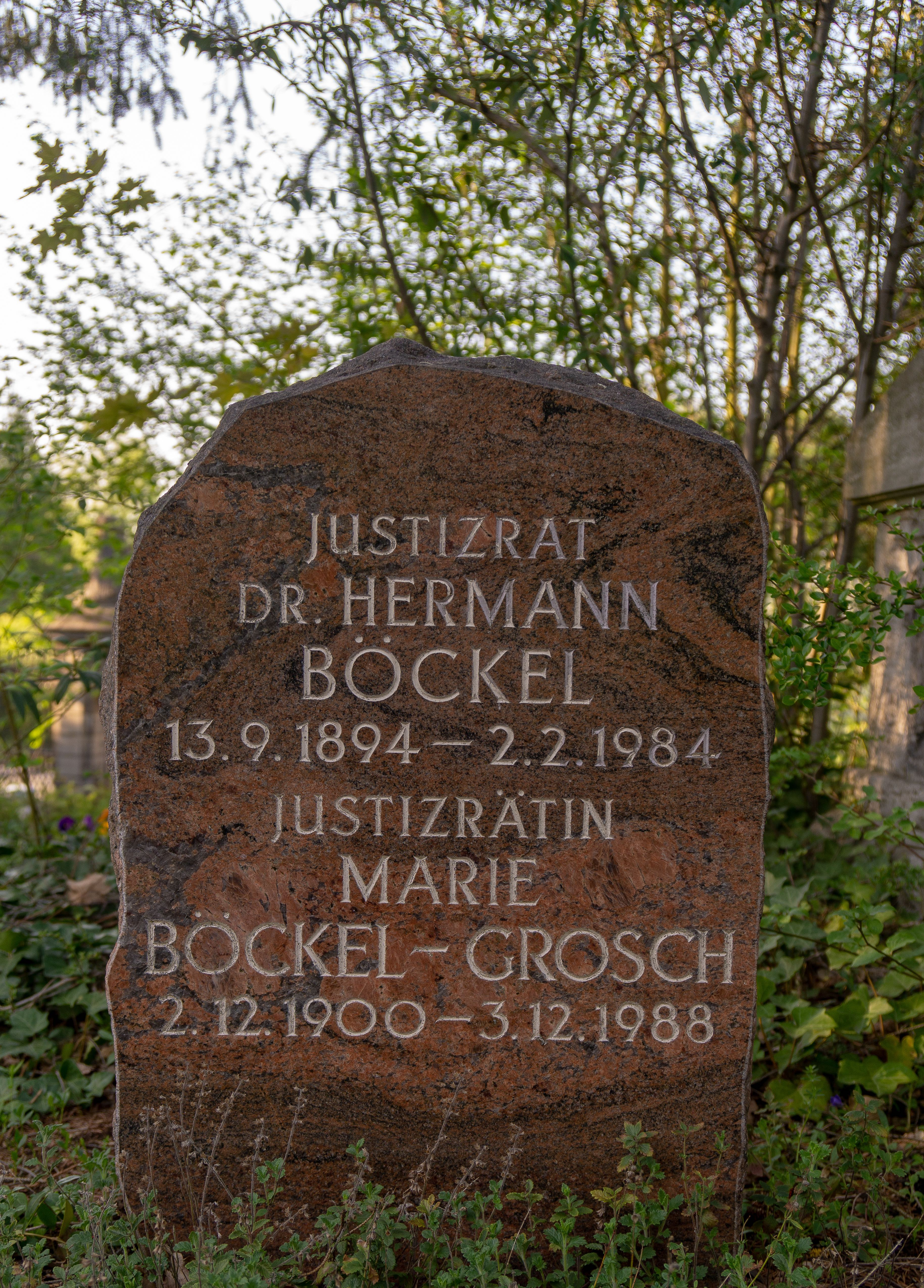 Grabstein von Hermann Böckel und Marie Böckel-Grosch aus dem Mainzer Hauptfriedhof